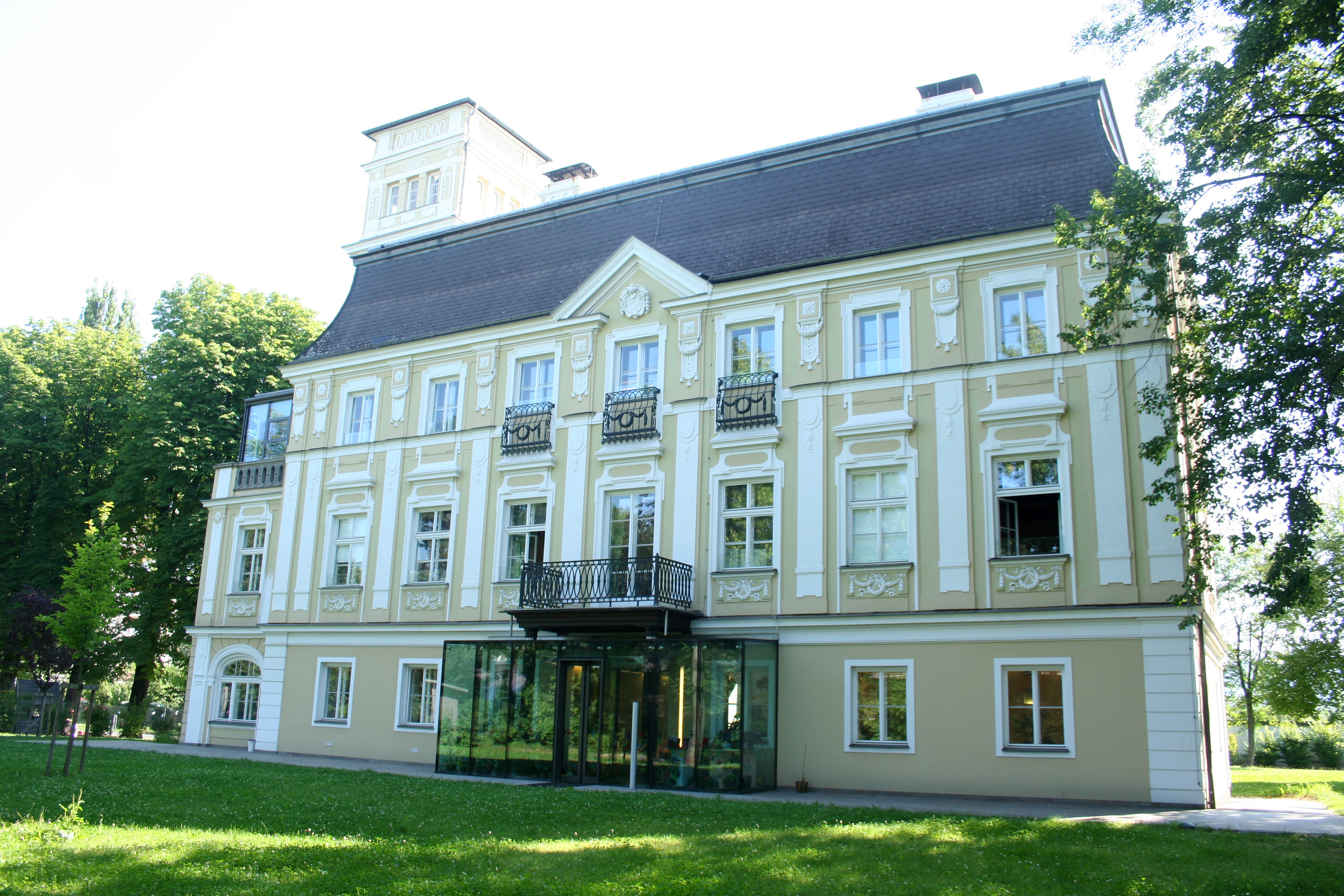 Villa Poschacher/ehem. Gabrielenhof mit Portalanlage